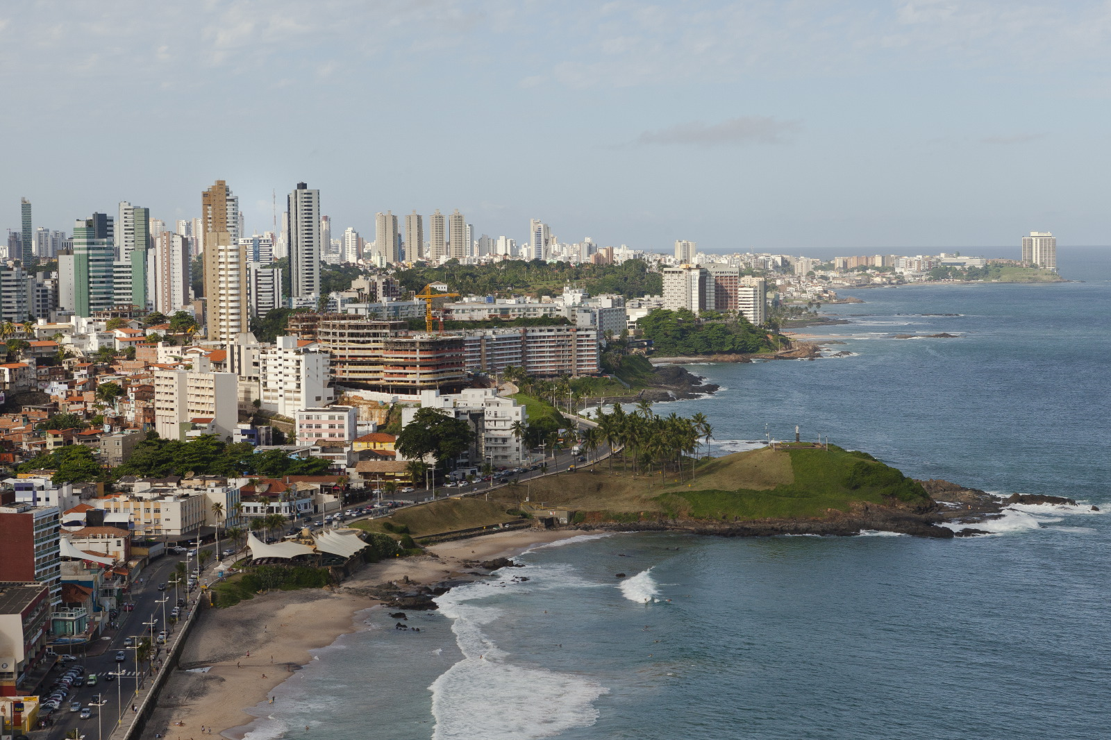 Morro do Cristo, em Salvador.